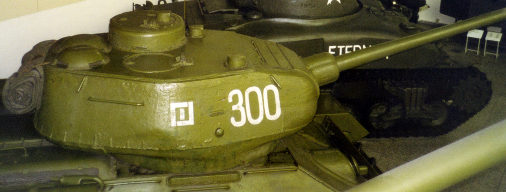 T-34/85 Turm im Detail (Ausgestellt im Militärhistorischen Museum der Bundeswehr in Dresden)